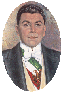 Adolfo_de_la_huerta